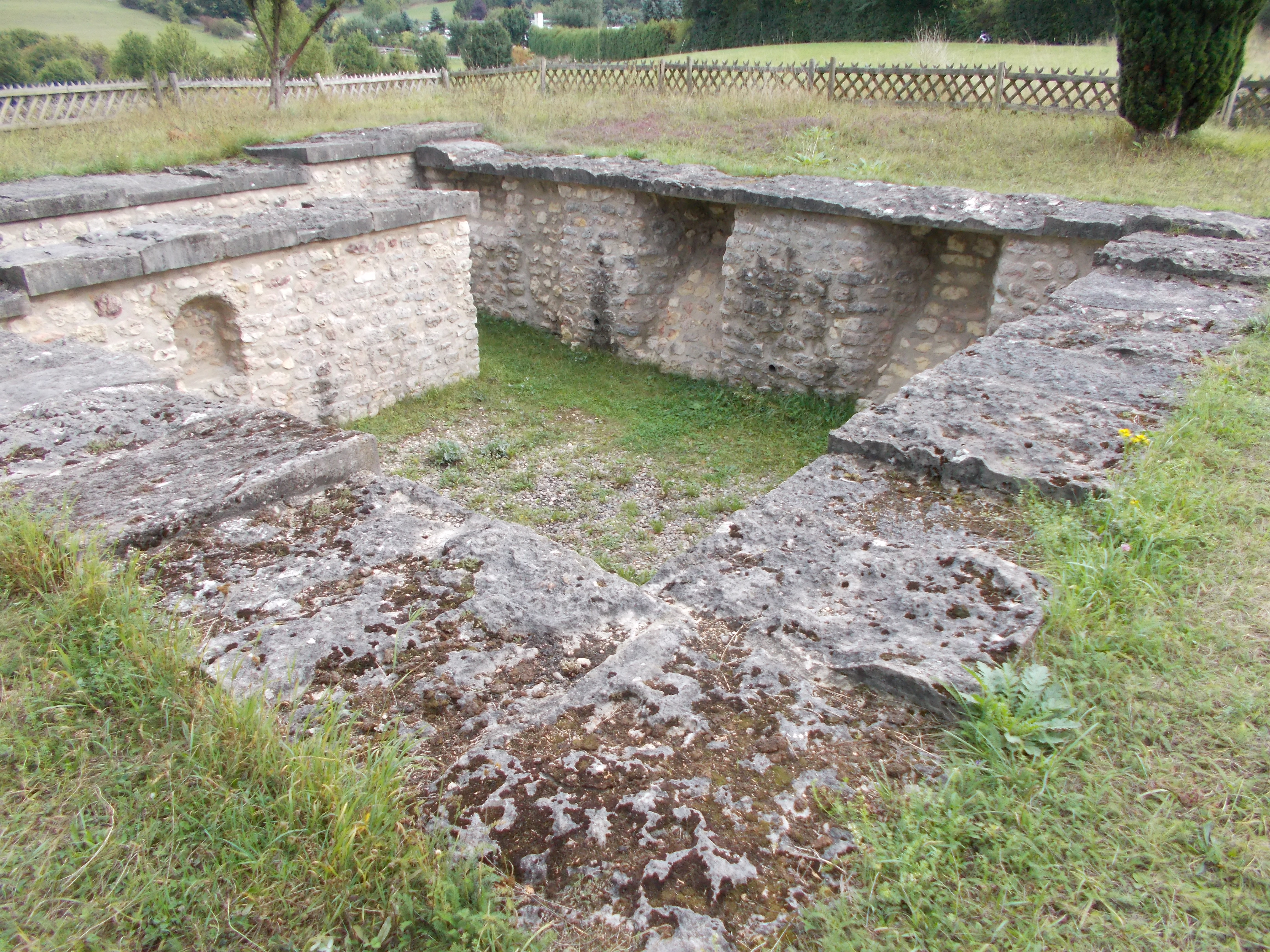 Römerkeller Oberkochen